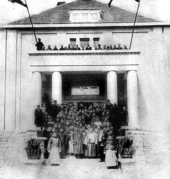 青岛胶海关新楼落成仪式，标“O”者为时任德国胶澳总督麦维德（Alfred Meyer-Waldeck），标“△”者为胶海关税务司阿理文（Ernst Ohlmer），“×”标记的为吕海寰，吕海寰与阿理文中间后方为赵尔巽。